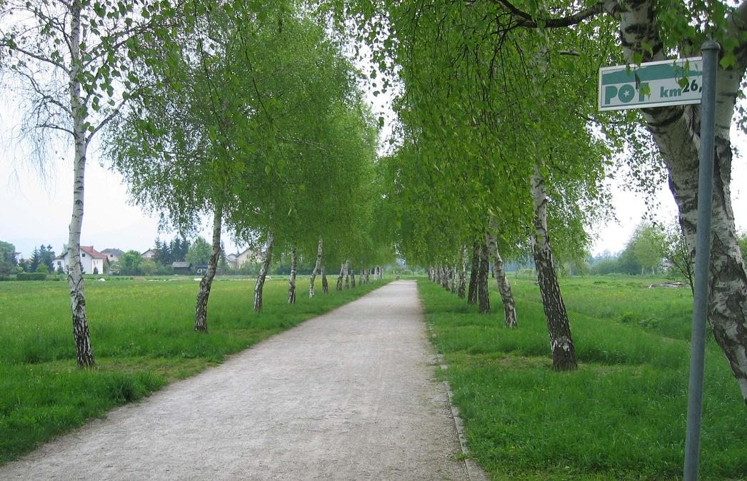 Trail of Remembrance and Comradeship (Pot spominov in tovarištva) - Ljubljana Tree lane photo:Ziga 08:48, 7 May 2006 (UTC)